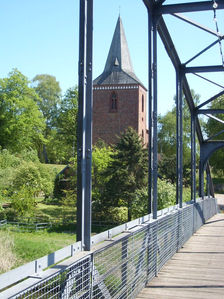 Kirche in Berkenthin von der alten Fußgängerbrücke über den Elbe-Lübeck-Kanal aus.